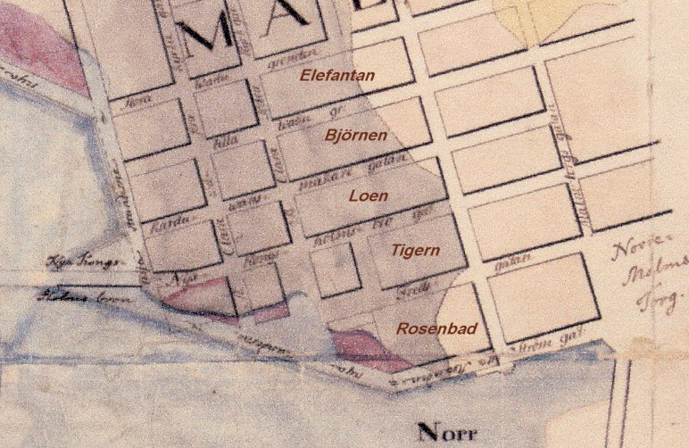 Klarabranden 1751 i kvarteren Elefanten, Björnen, Loen, Tigern m.fl.